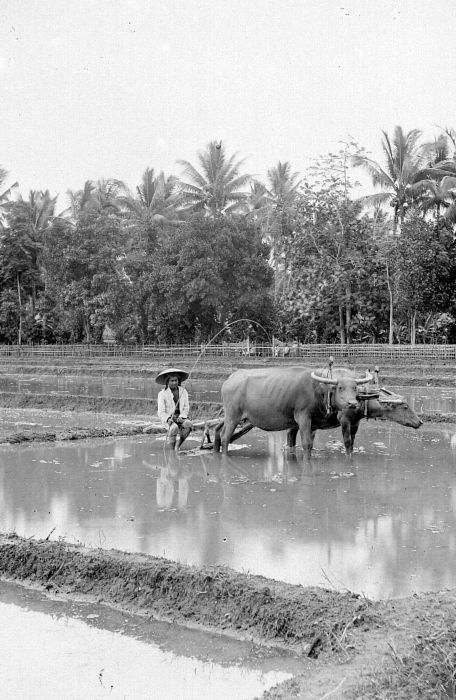 Negatief. Een Javaan ploegt met behulp van twee karbouwen een rijstveld (sawah) om